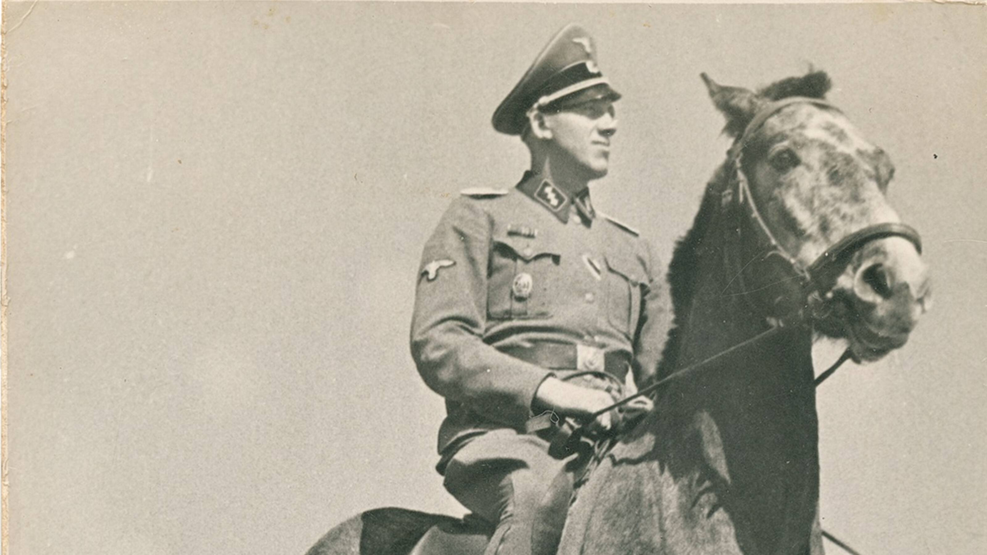 Niemann op het perron waar de treinen met gevangenen aankwamen.